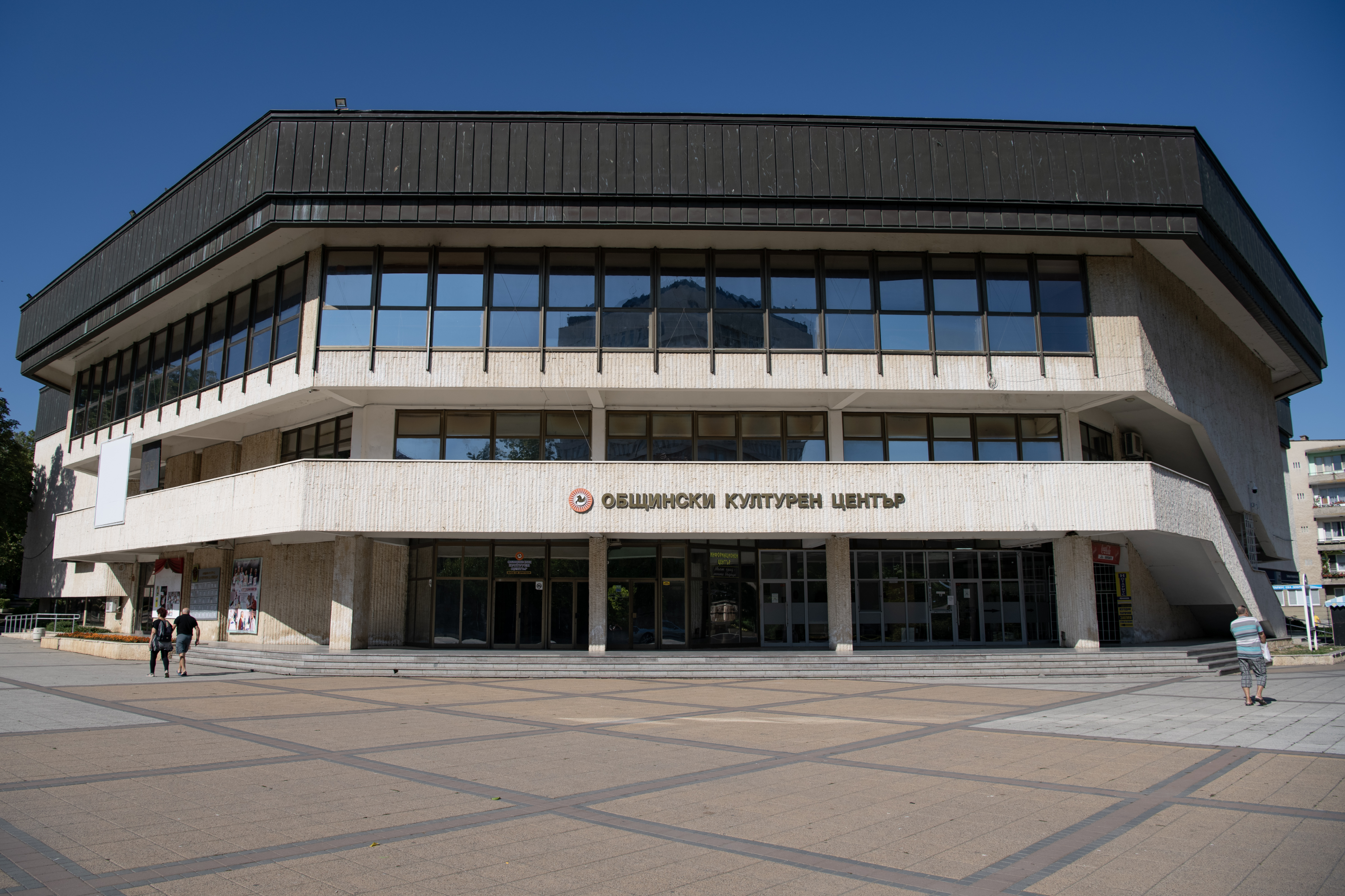 Снимката документира общинския културен център в град Разград.